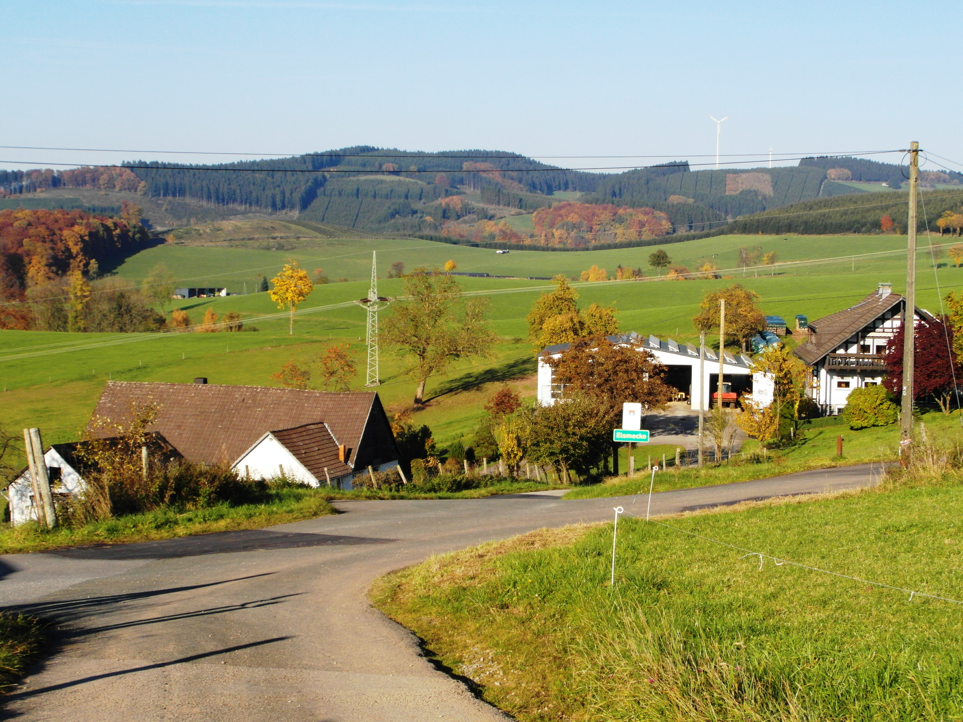 Weiler Elsmecke (Finnentrop), ortsprägend ist das Anwesen eines Transportunternehmens